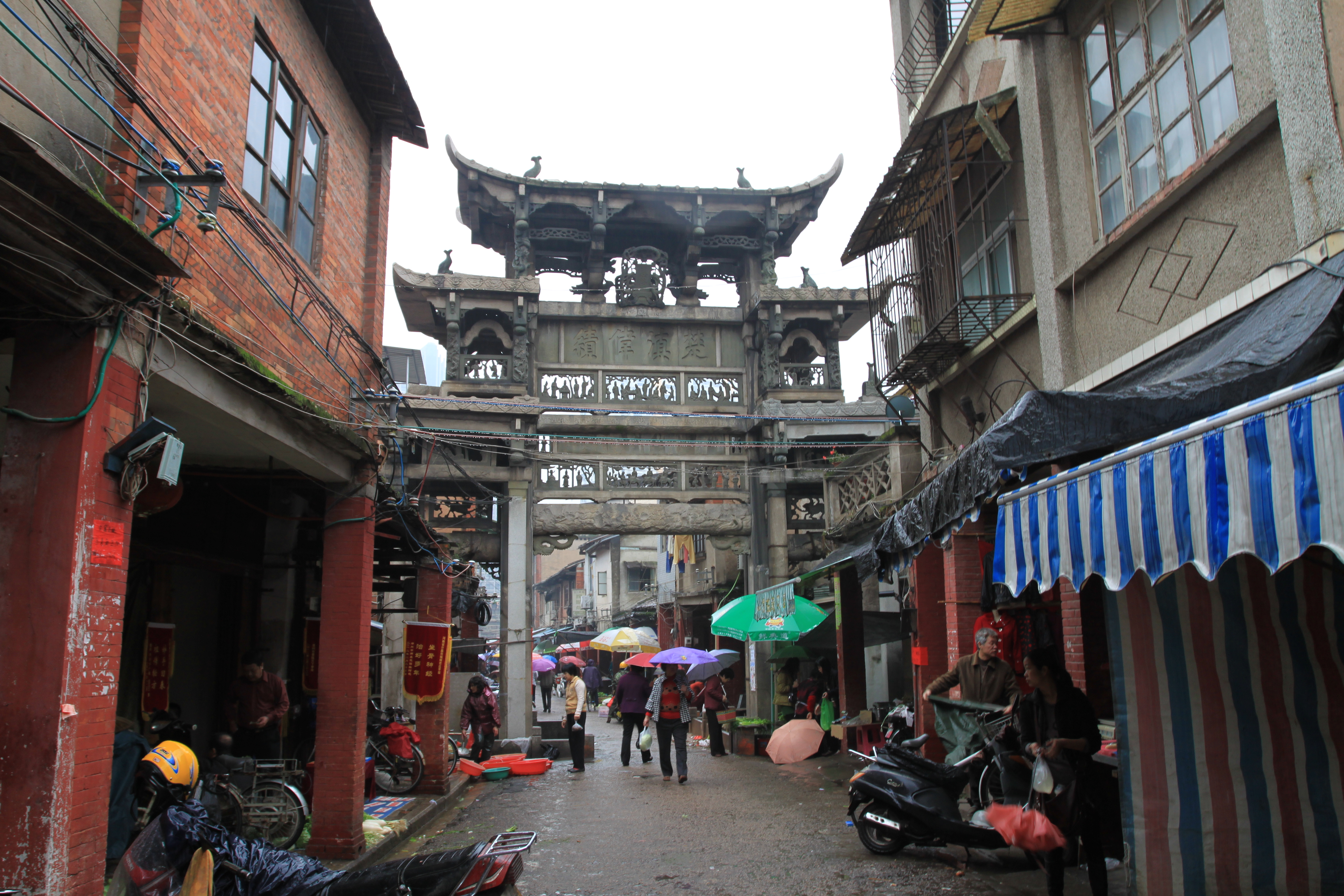 漳州石牌坊，位于中国福建省漳州市，是全国重点文物保护单位。